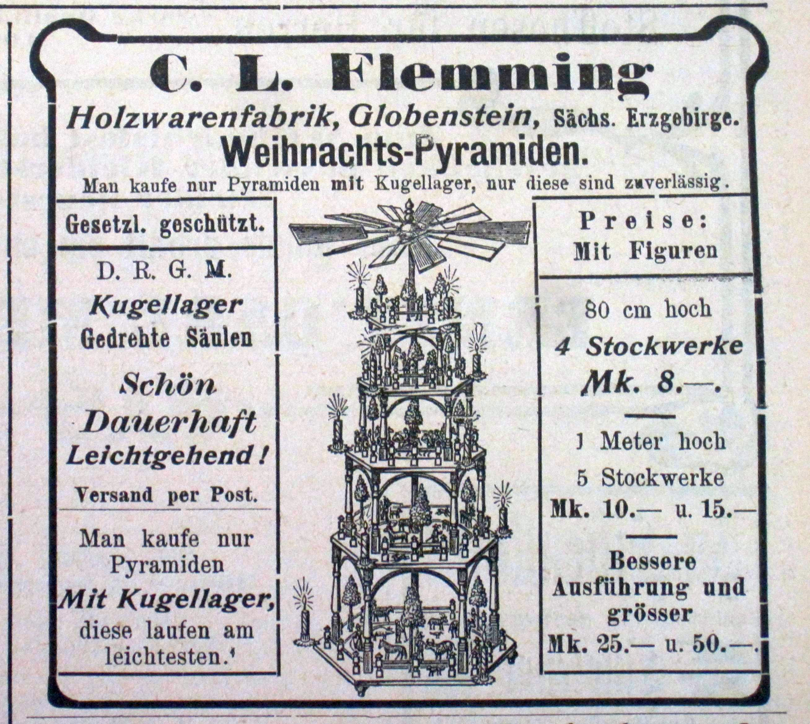 Die Globensteiner Pyramide ist eine Besonderheit: Im Erzgebirge entstanden Pyramiden meistens als Einzelstücke, die geschickte Männer neben ihrem Beruf konstruierten und bauten, eher als Freizeitbeschäftigung oder um etwas hinzu zu verdienen. Die Firma Carl Ludwig Flemming in Globenstein bei Schwarzenberg stellte Produkte wie Handwagen und Kleinmöbel her. Um 1900 entwickelte sie ein Pyramidensystem, für das sie kleine Holzreste aus der Hauptproduktion verwenden konnte. Die Konstruktion erlaubte, daß Pyramiden unterschiedlicher Höhe angeboten, die Flügel seitlich in die Böden gesteckt und die Kerzenhalter hochgeklappt werden konnten. Für ihr Serienprodukt, das es mit und ohne Figuren gab, warb sie in vielen Zeitungen. Sie verschickte ihre Pyramiden in pyramidenförmigen Kartons mit der Post, in guten Zeiten über 5000 Stück im Jahr. Mit und ohne Geläut, mit und ohne Figuren - ganz nach Bestellung. Die Figuren können nach Belieben auf die Teller gestellt werden. - Anzeige im Schönheider Wochenblatt im Dezember 1904.